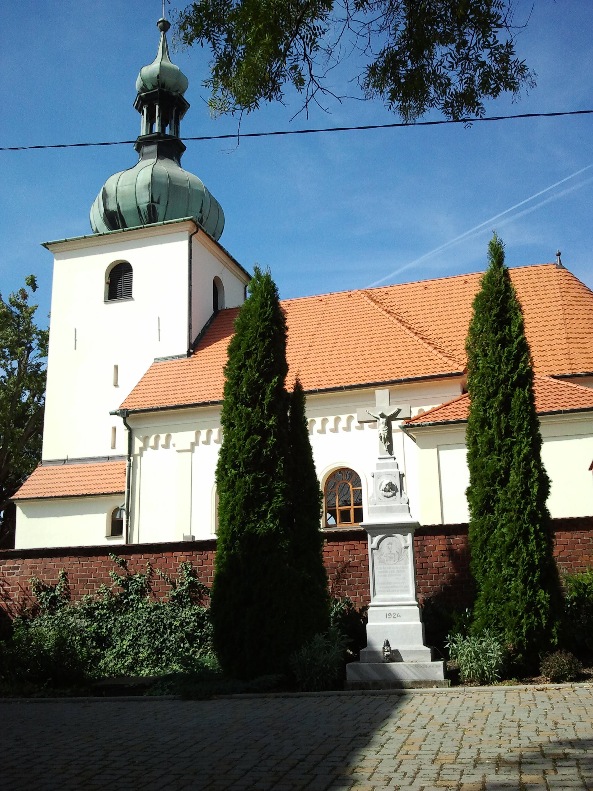 Kostel sv. Bartoloměje (Olbramice), V okraj obce, Olbramice